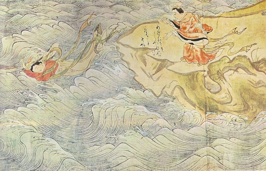 Zemmyō se jette à la mer par le peintre japonais Enichibō Jōnin (XIIIe siècle). Kegonshū-soshi-eden (Vie de Gishō et Gengyō, moines de la secte Kegon en Corée), attribué à Enichibō Jōnin: Zemmyō se jette à la mer à la poursuite de Gishō (scène du troisième rouleau de la Légende de Gishō)- première moitié du XIIIe siècle - rouleau horizontal, couleurs sur papier - (H. 31,6cm). Au (Temple Kōzan-ji)-Kyōto.